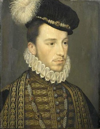 Ce portrait du futur roi Henri III a longtemps été identifié comme étant celui de son frère François d'Alençon, en raison de l'inscription erronée François de France duc d'Alençon, peinte au bas de la peinture.